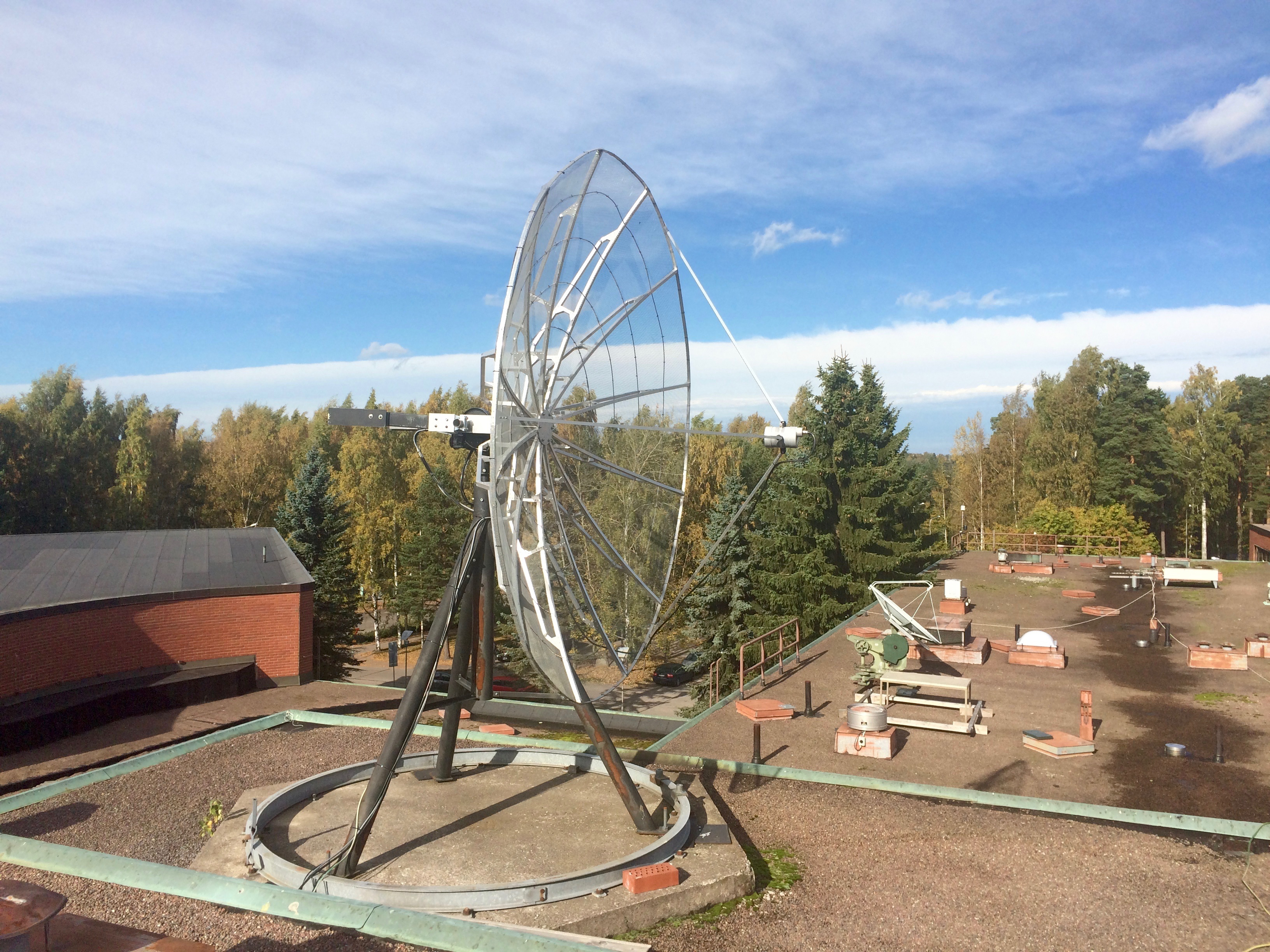 Otaniemessä sijaitsevan maa-aseman lautasantenni.